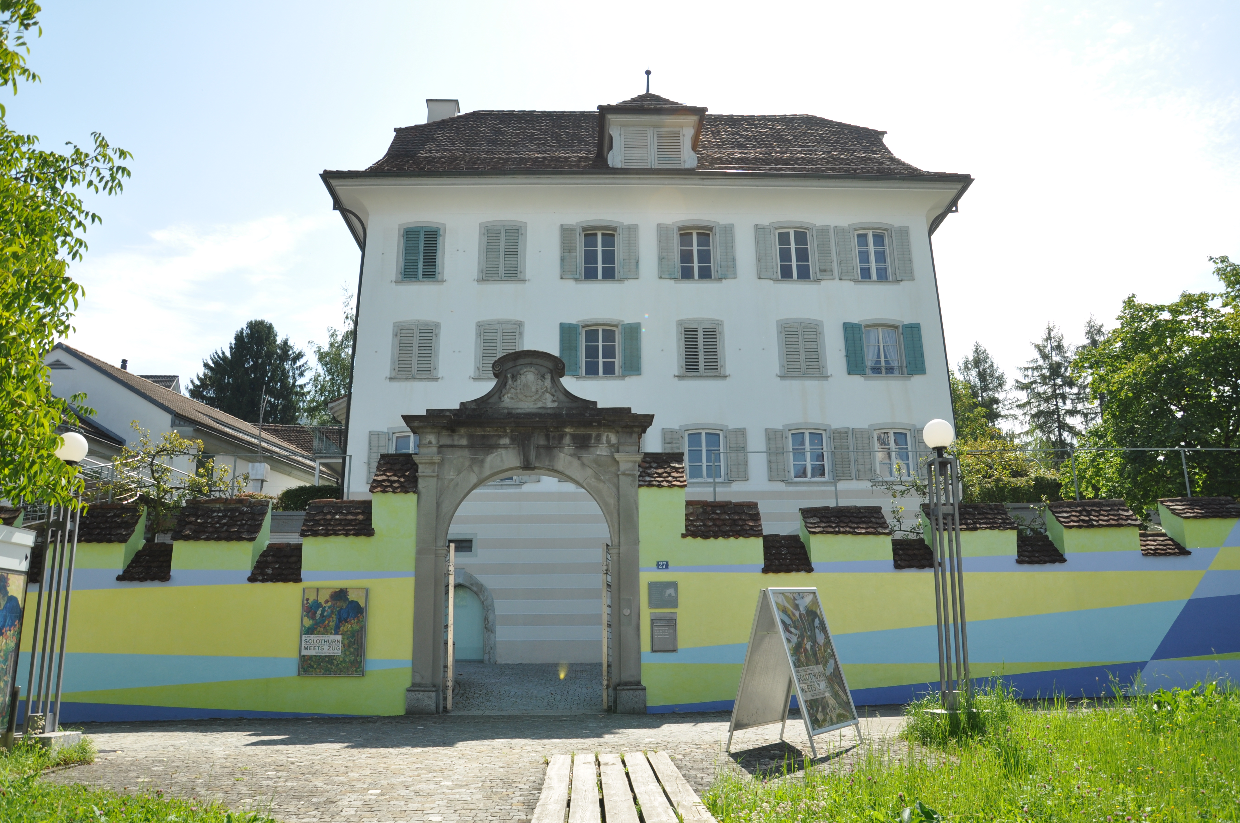 Kunsthaus Zug